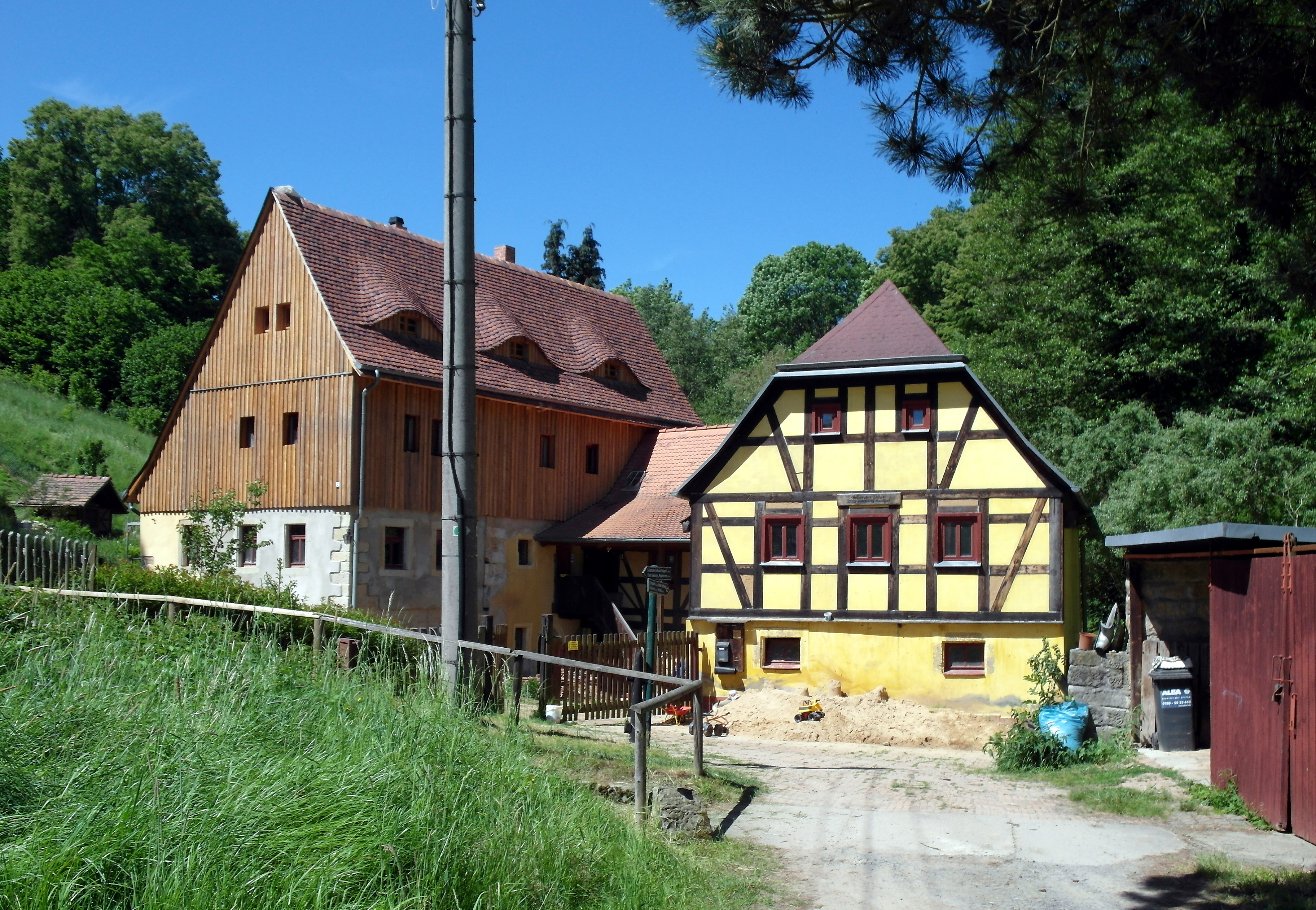 20.05.2018 Golberode (Bannewitz): Golberoder Mühle, 1542 erstmals erwähnt, am Geberbach (GMP: 50.986419,13.754086). Sicht von Osten. [SAM6294.JPG]20180520170DR.JPG(c)Blobelt